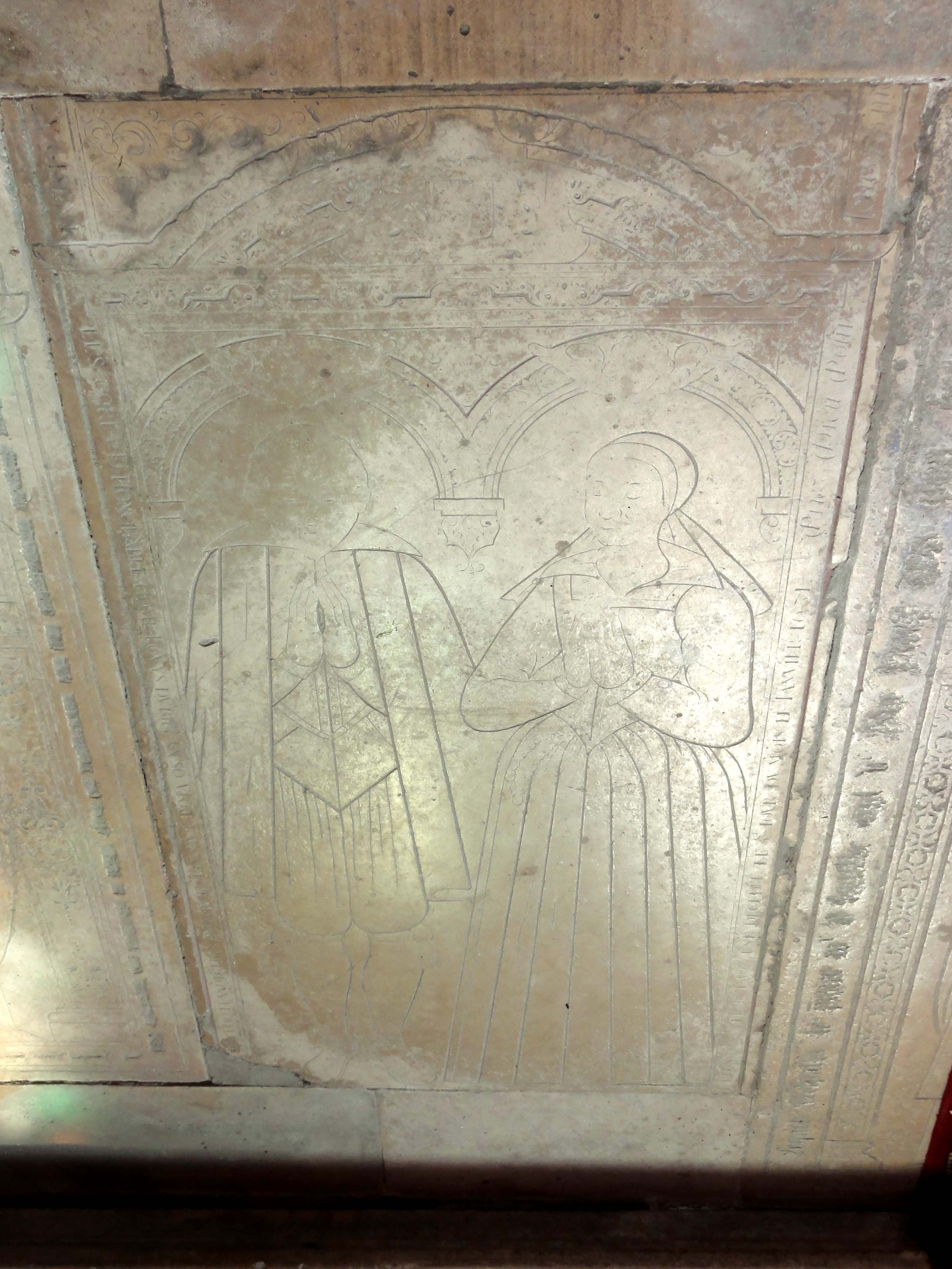 Dalle funéraire à effigies gravées de Louis Dubief et sa femme, 1631.